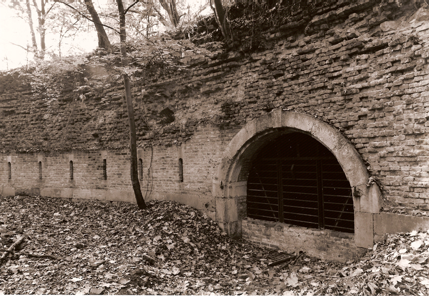 Redan du fort de la Chartreuse (Liège, Belgique). En 1988, le mur de parement a été partiellement restauré avec l'aide d'un groupe de jeunes naturalistes du WWF et d'un maçon. Les galeries souterraines ont été aménagées en refuge pour la faune cavernicole. Ce fort date du XIXe siècle (1817-1823).